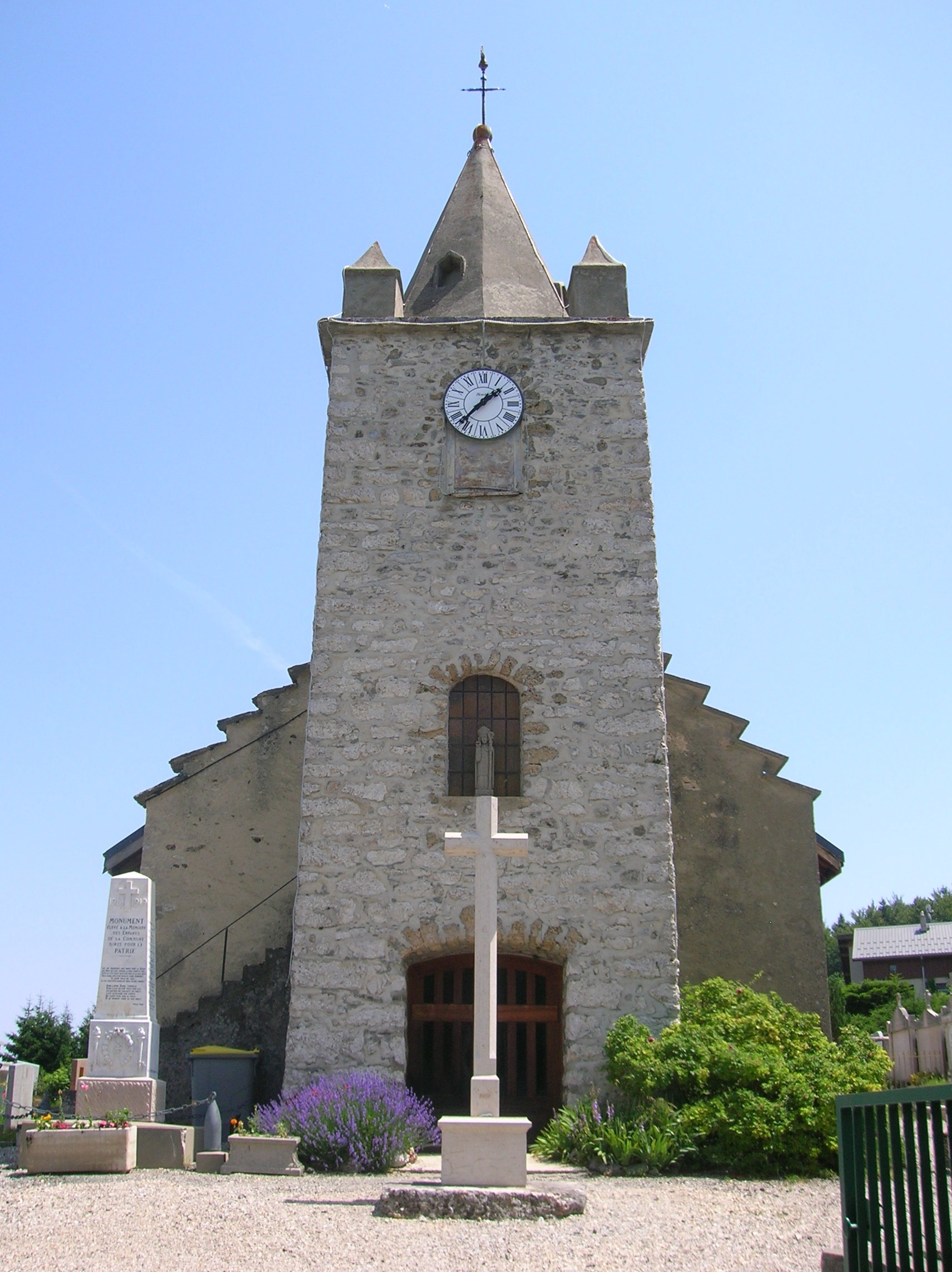 Saint-Nizier-du-Moucherotte, Isère, France.